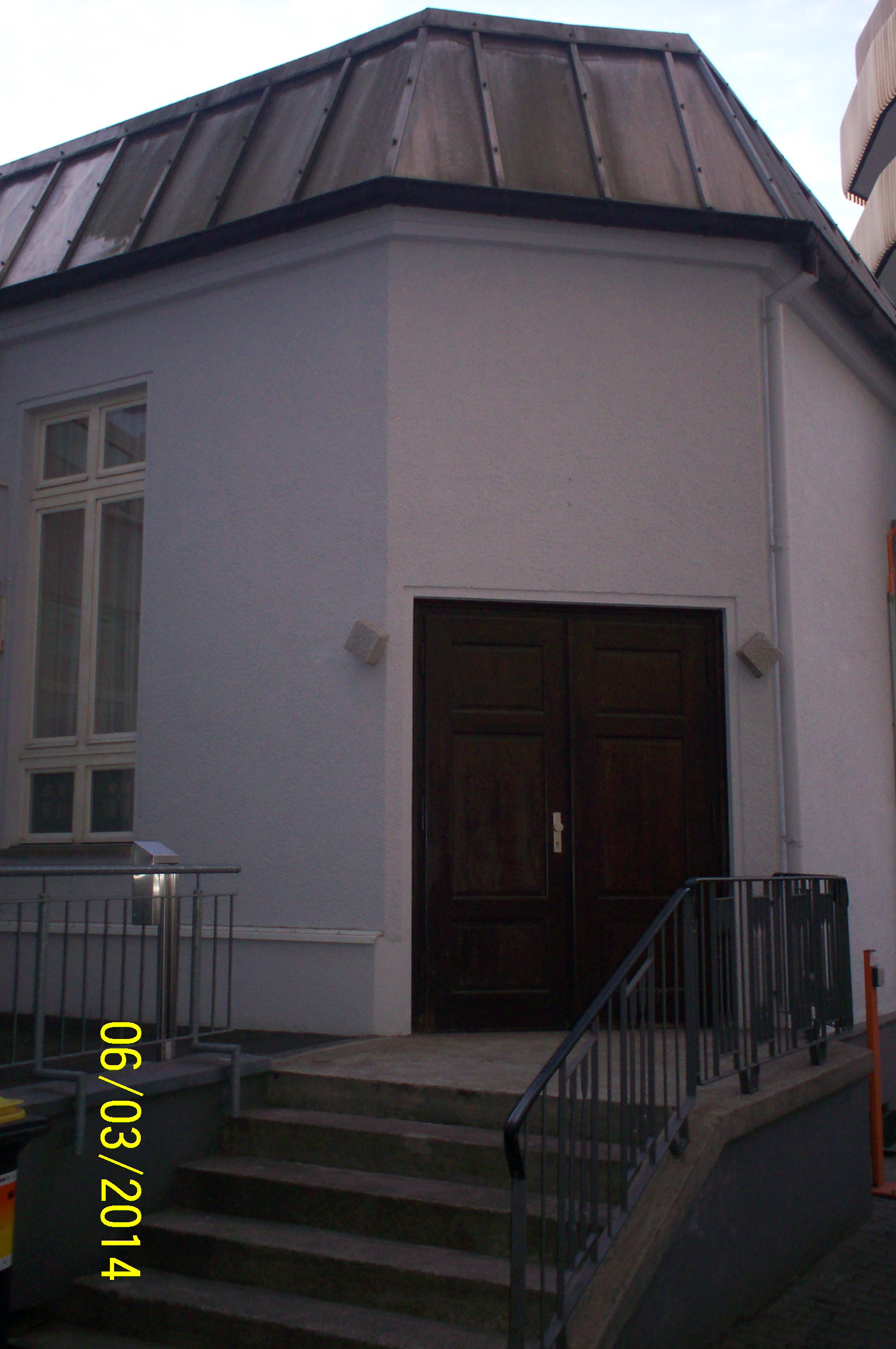 Ehemaliger Kirchsaal der Brüdergemeine im Hof des Dietrich-Bonhoeffer-Hauses, Kalkscheunenstraße Ecke Ziegelstraße, Spandauer Vorstadt, Mitte, Berlin